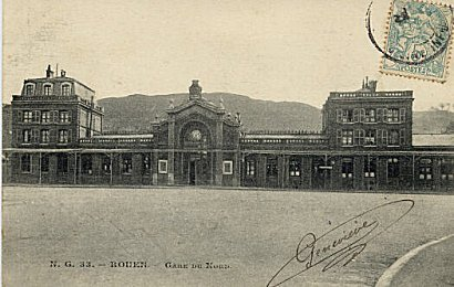 Gare de Martainville ou Gare du Nord, Rouen. N. G. 33